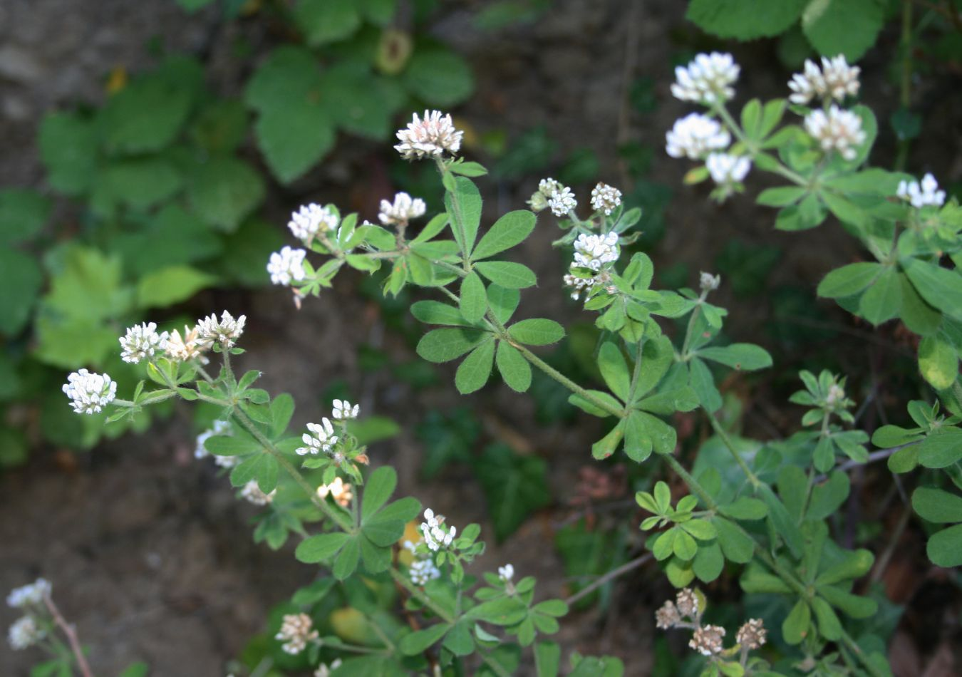 Dorycnium graecum, Hülsenfrüchtler (Fabaceae), Faboideae - Türkei/Türkiye/Turkey: Düzce Prov./Düzce ili, NW Kalkın W Akçakoca, Eichen-Mischwald